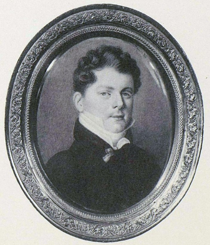 Князь Василий Сергеевич Голицын (1792-1856), был женат на Елене Александровне Суворовой, ур. Нарышкиной